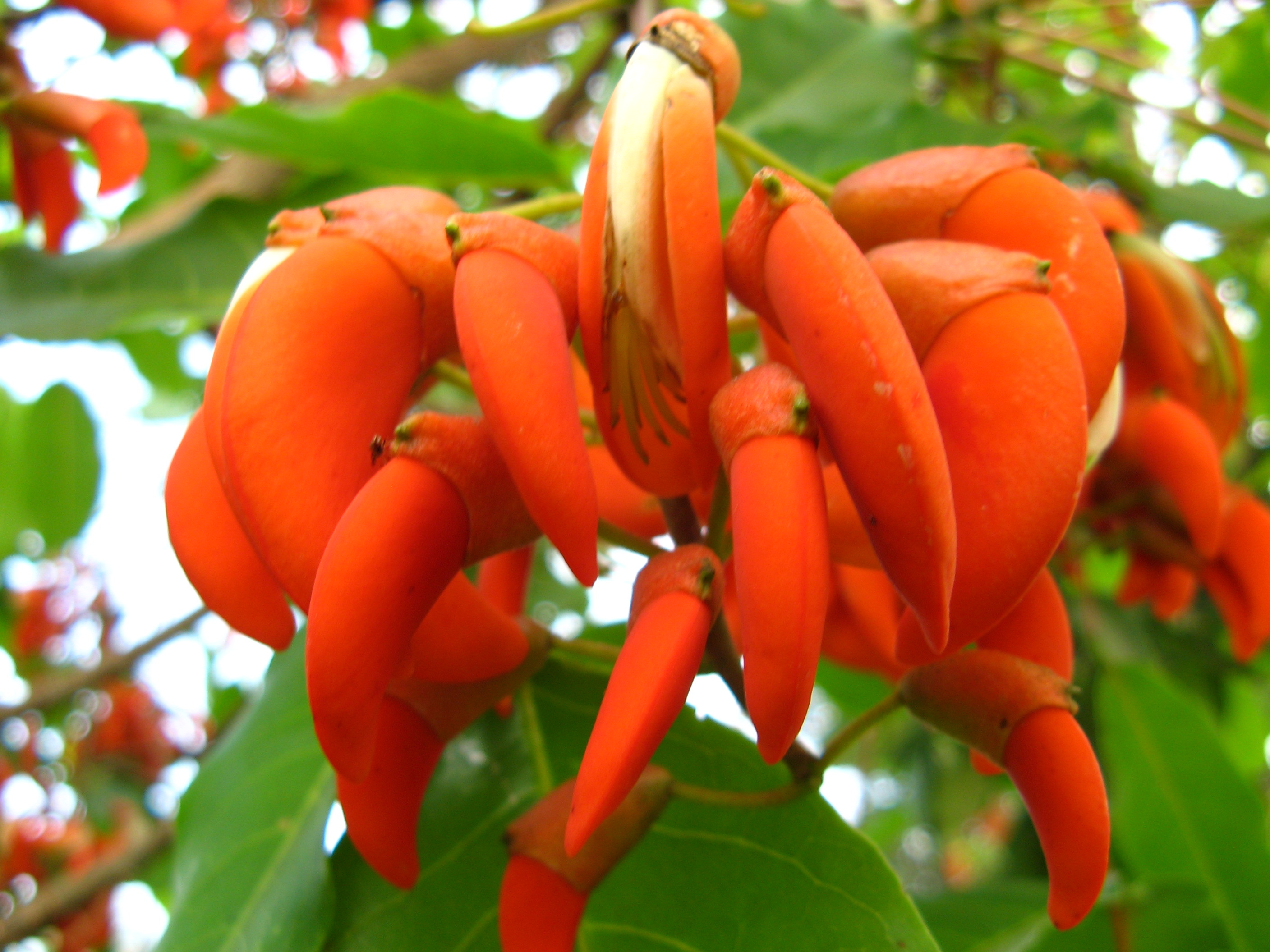 suina mococa